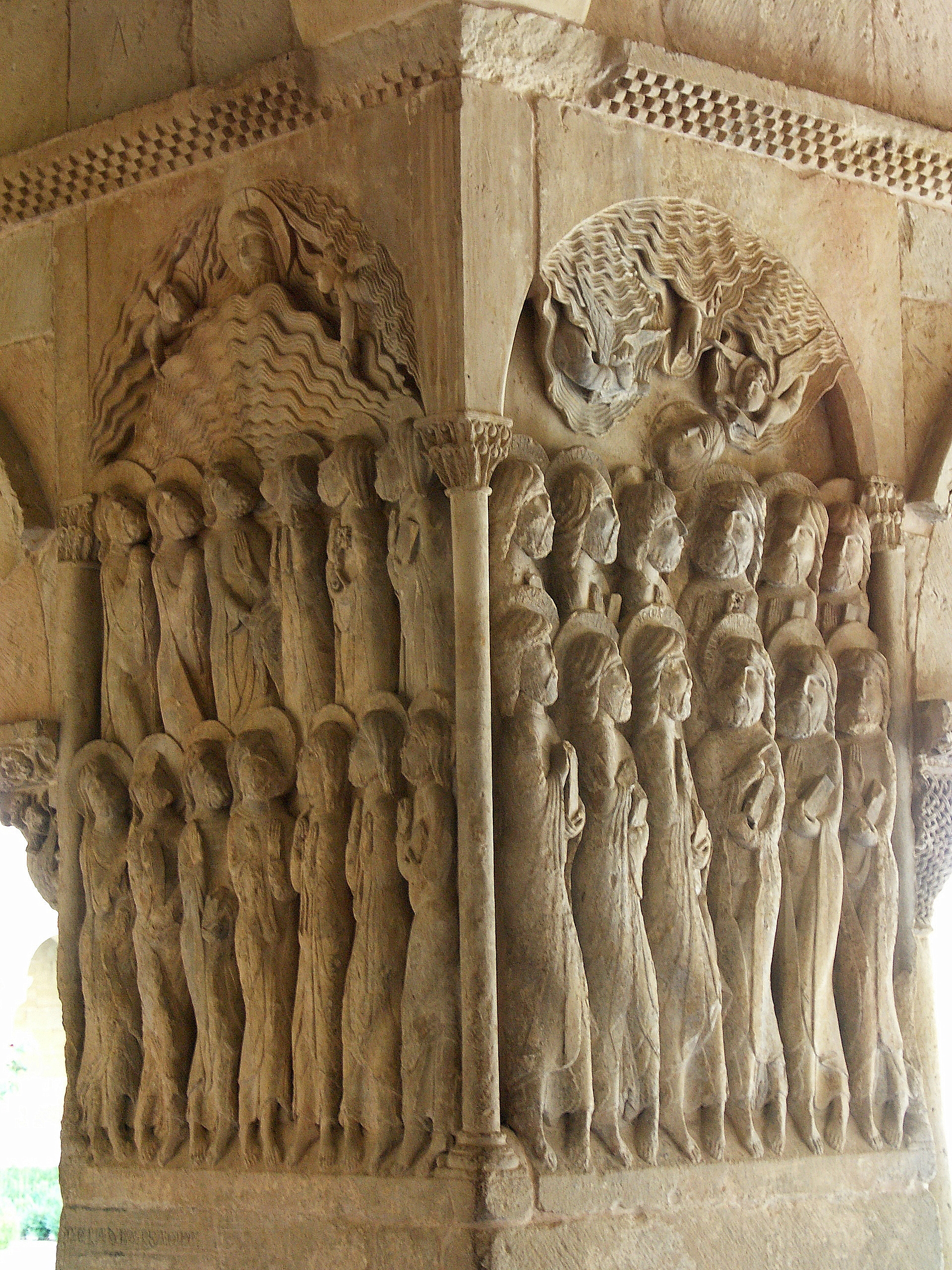 Himmelfahrt und Pfingsten , Sto. Domingo de Silos, Spanien, Eckpfeiler im Kreuzgang des Klosters